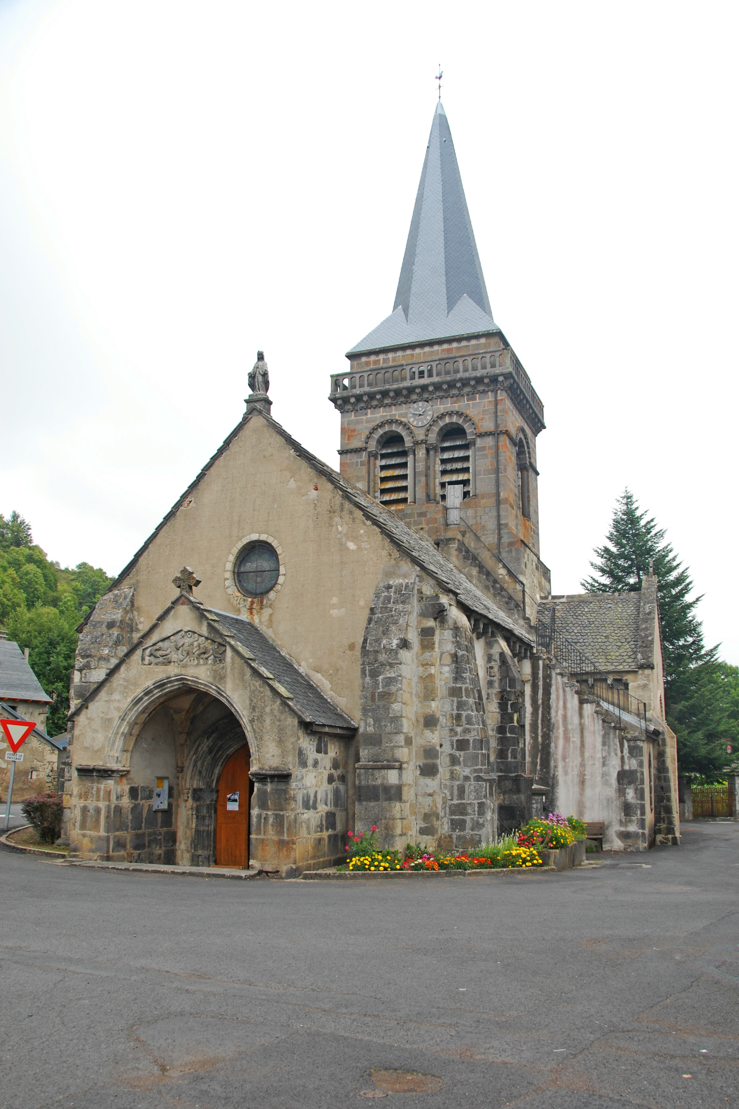 Dorfkirche_Chambon-sur-Lac, Ansicht von W